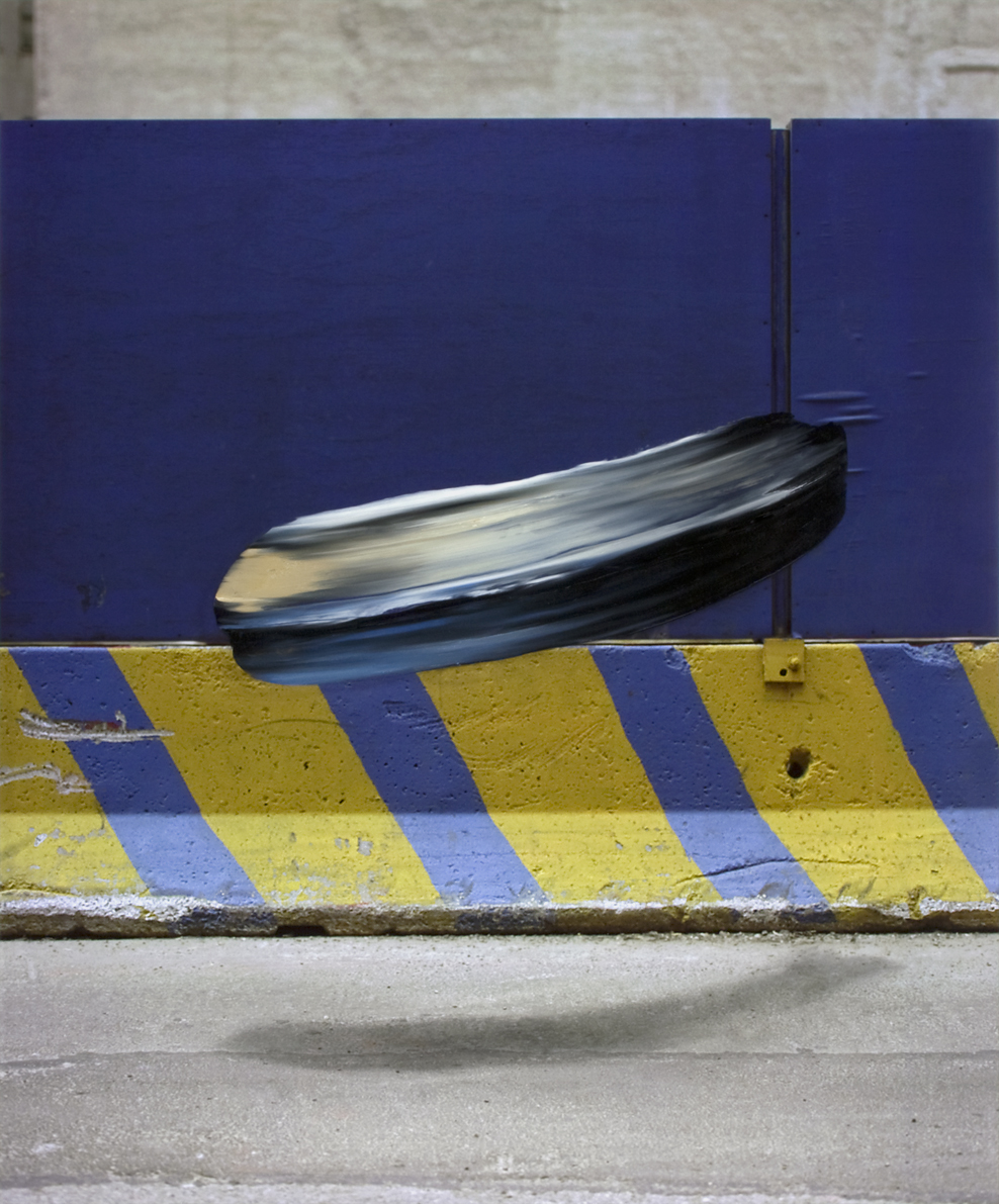 Bemalte Fotografie von Marc Lüders. Titel: "Objekt 709-7-2". Entstehungsjahr: 2006